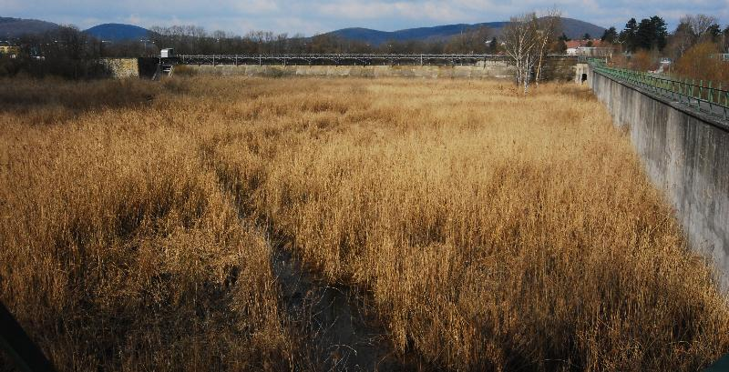 Eines der Rückhaltebecken der Retentionsbecken Auhof in Wien